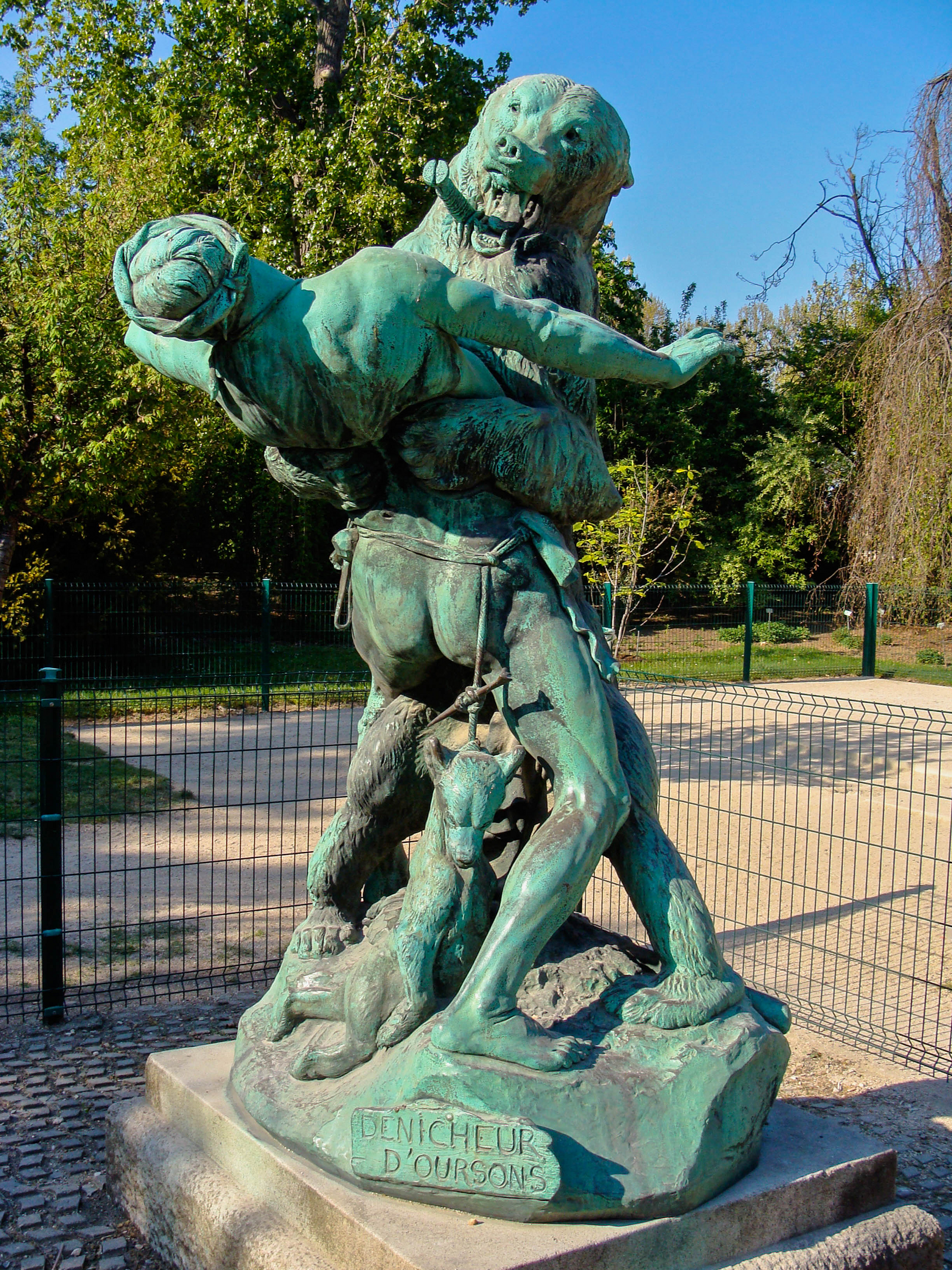 "Le dénicheur d'oursons" by Emmanuel Fremiet (+1910), Jardin des Plantes, Paris, Thiébaut frères fondeurs